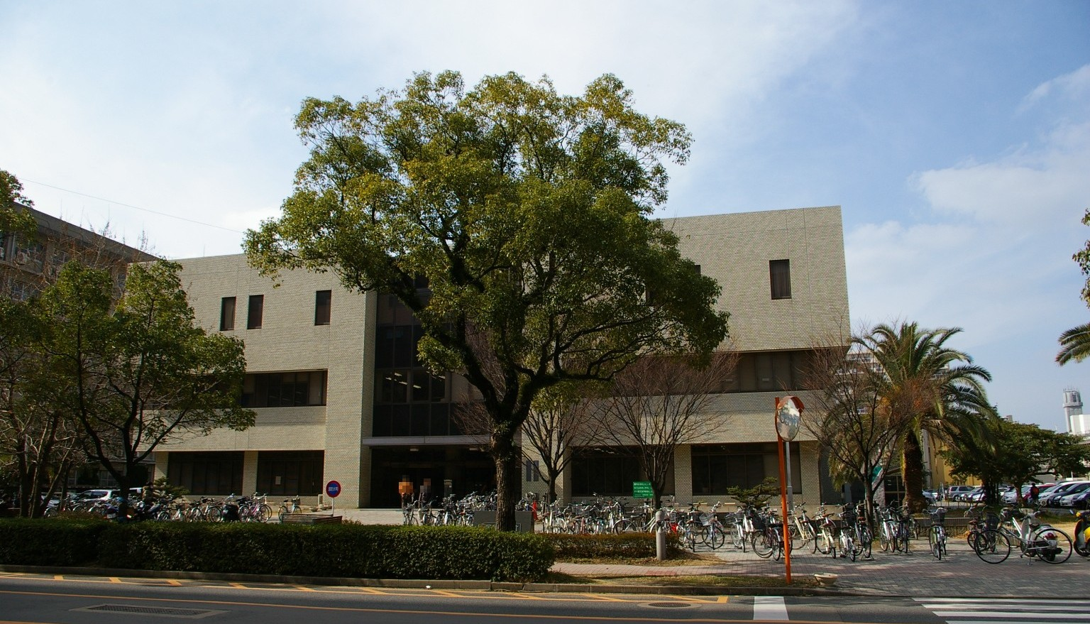 福岡市東区の九州大学馬出キャンパスにある医学図書館（附属図書館）。